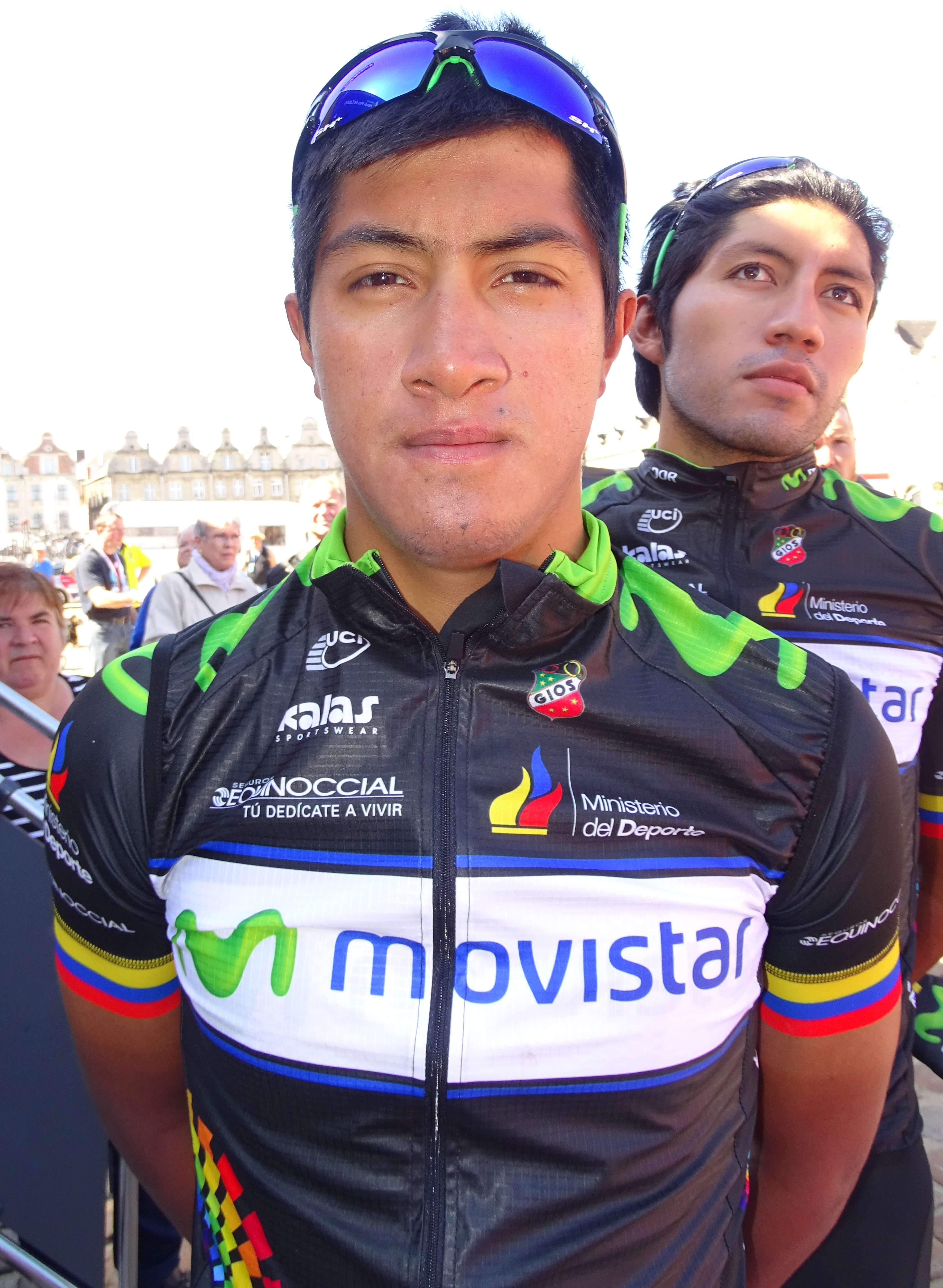 Reportage réalisé le dimanche 24 mai 2015 à l'occasion du départ et de l'arrivée de la troisième étape du Paris-Arras Tour 2015 à Arras, Pas-de-Calais, Nord-Pas-de-Calais, France. Depicted person: Jorge Luis Montenegro Depicted team: Ecuador